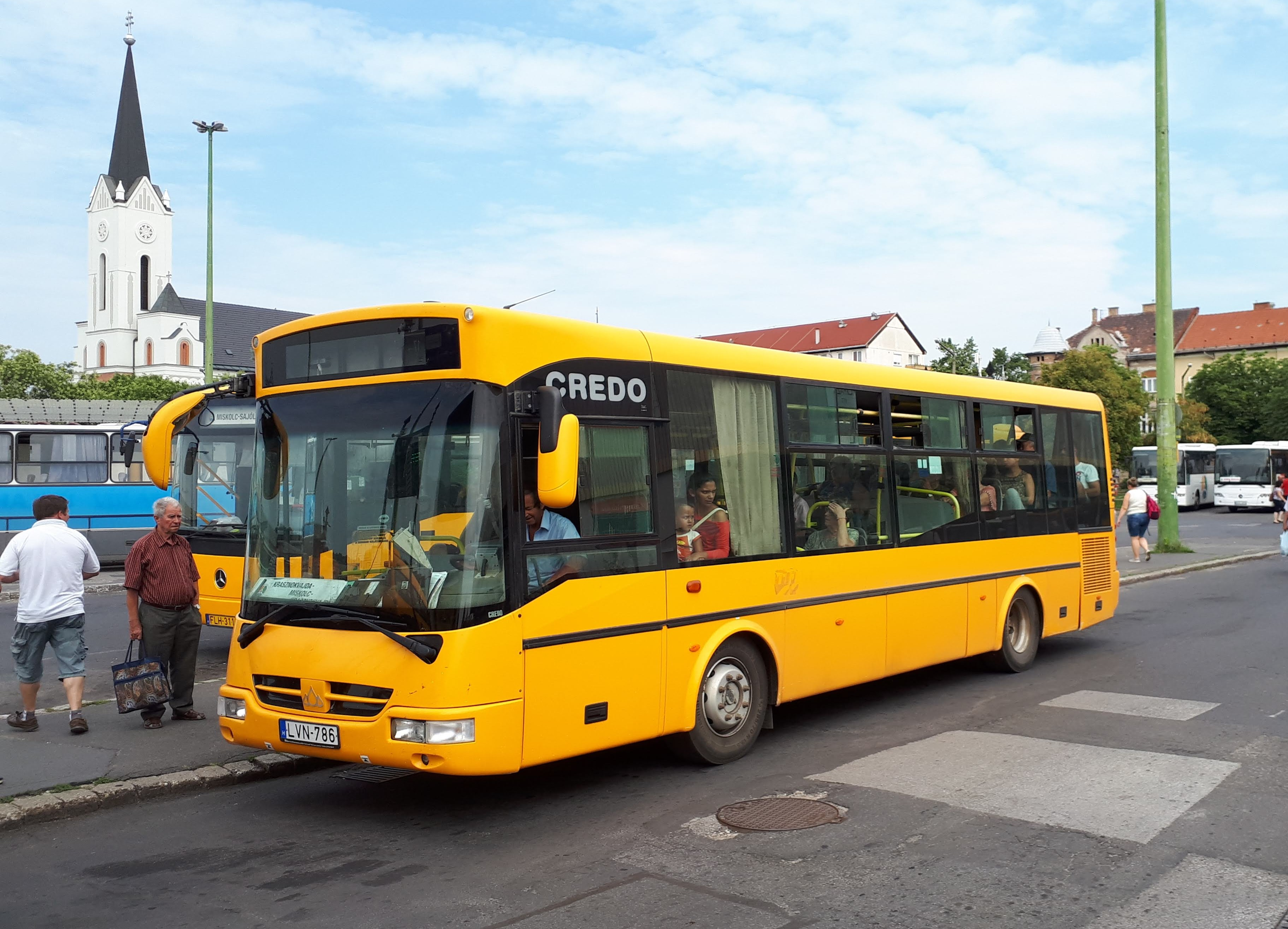 Az ÉMKK LVN-786 rendszámú Credo EN 9,5 típusú busza Miskolcon, a 3718-as helyközi járaton.